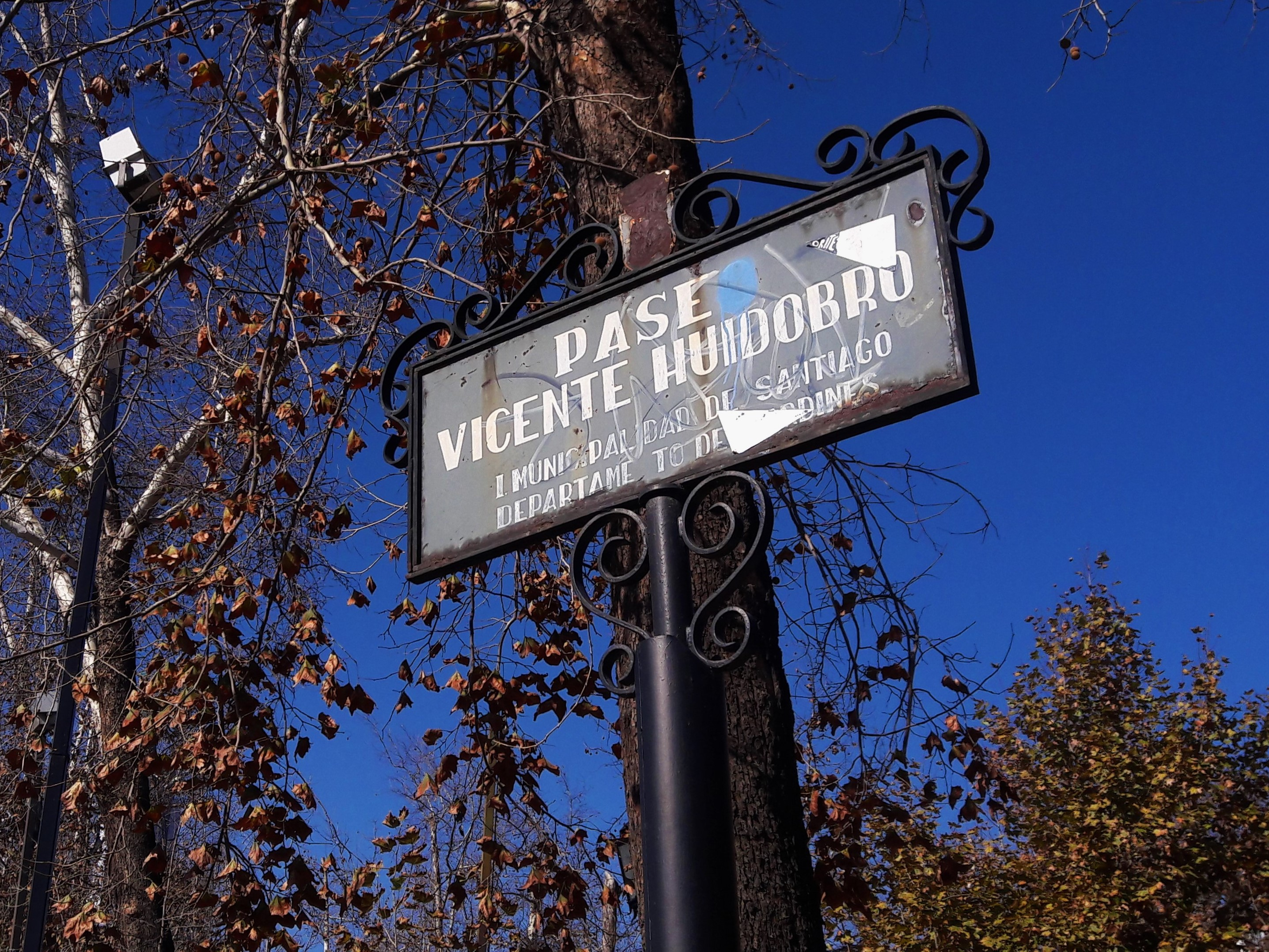 Letrero del paseo Vicente Huidobro